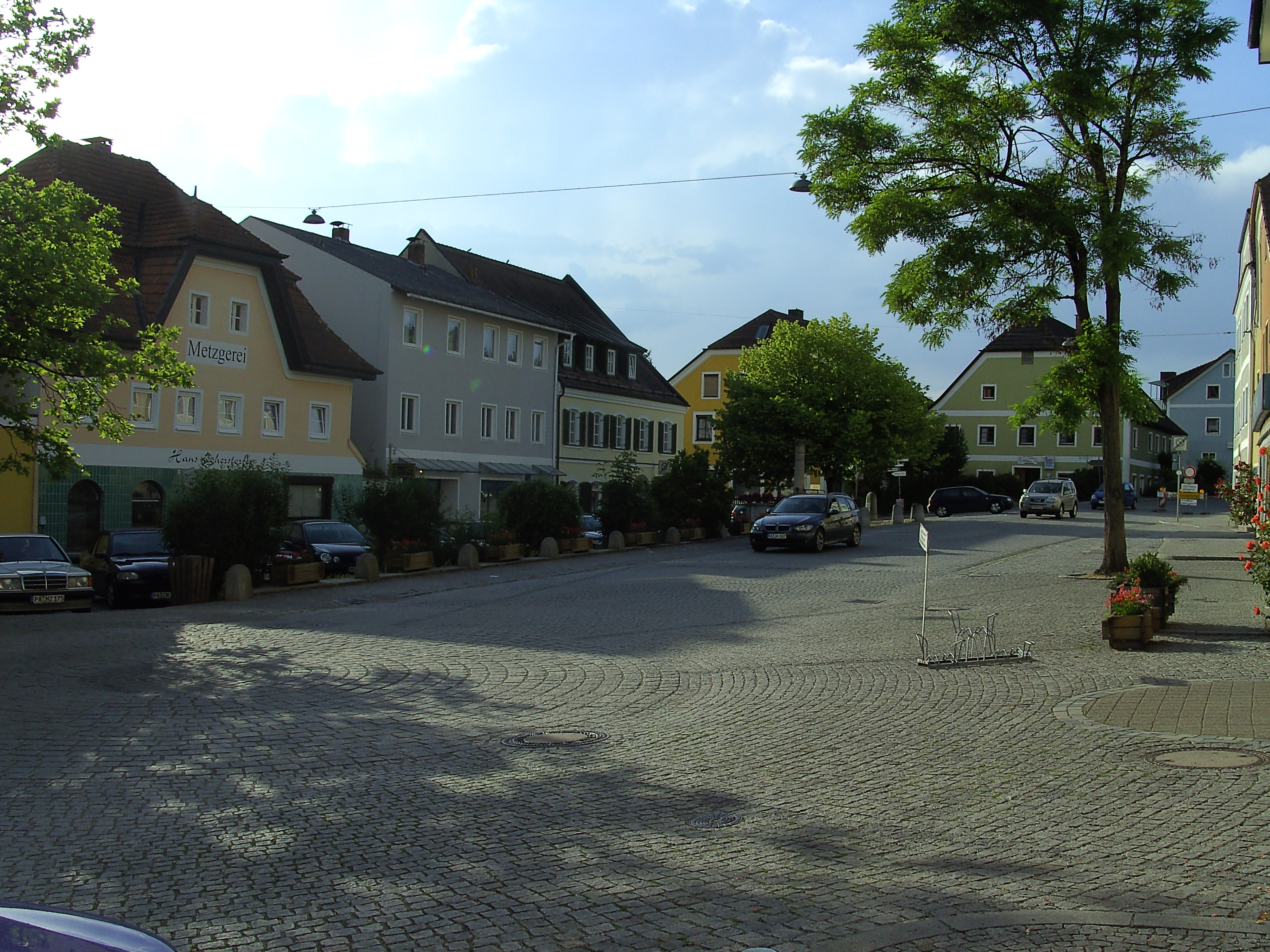 Marktplatz von Ortenburg, 2007.